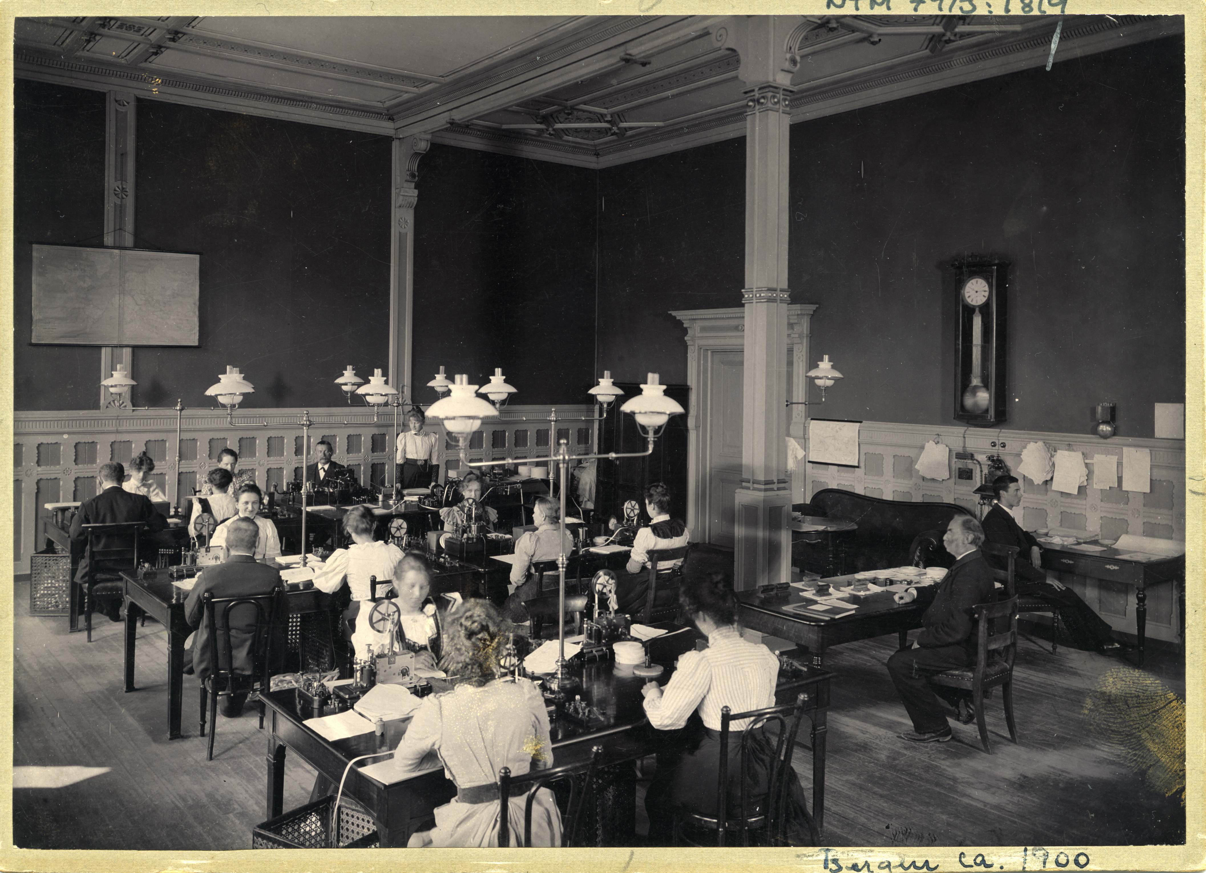 Bildet er hentet fra Arkivverket. Arbeid ved Bergen telegrafstasjon. Arkivinstitusjon : Riksarkivet Arkivnavn : Televerket, Fotosamlingen Sted : NORGE, Hordaland, Bergen , Emneord: Telefon, Telefoni, Arbeidsliv, Televerket, Kvinner Avbildet